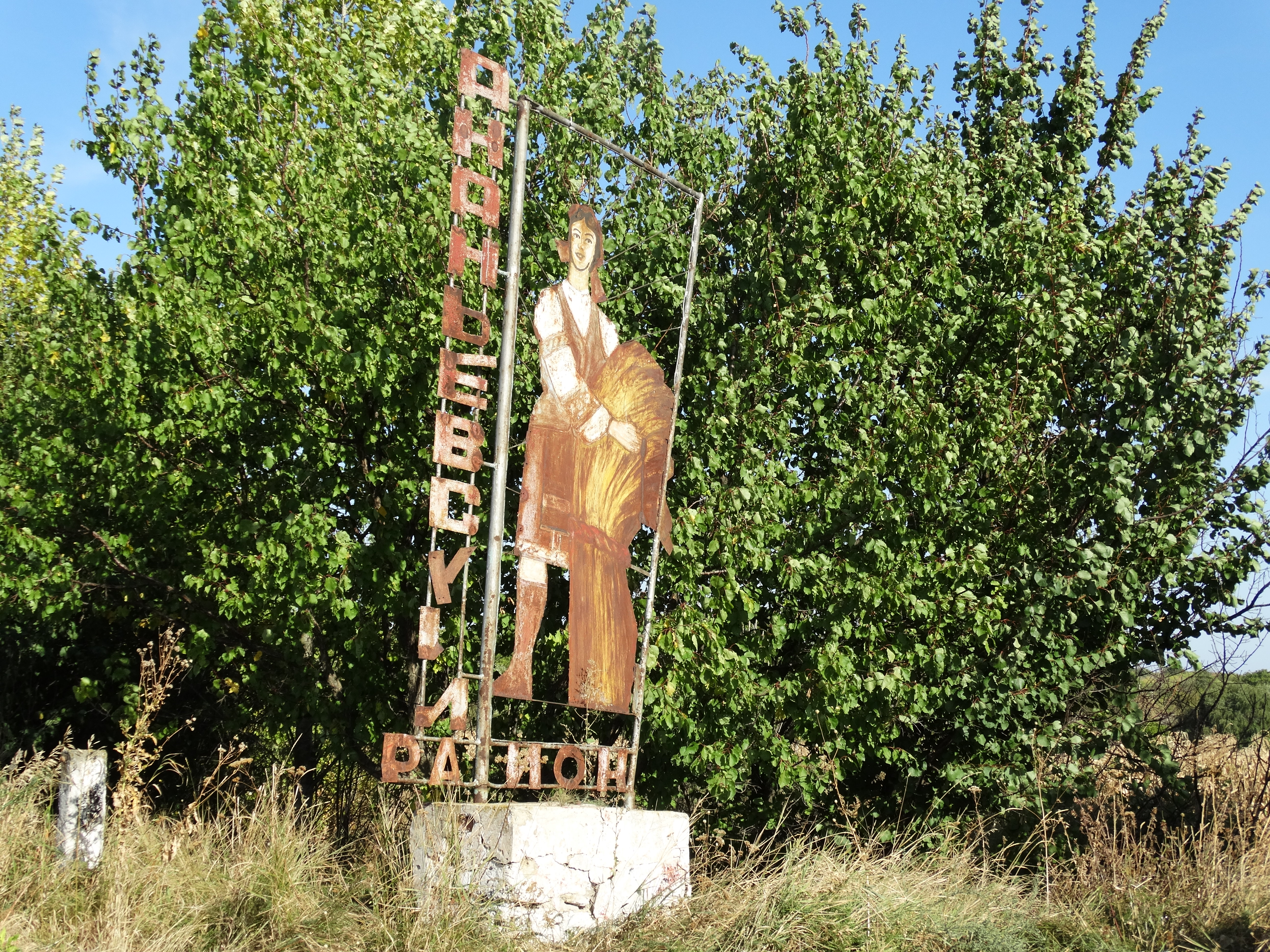 Вікіекспедиція на північ Одещини